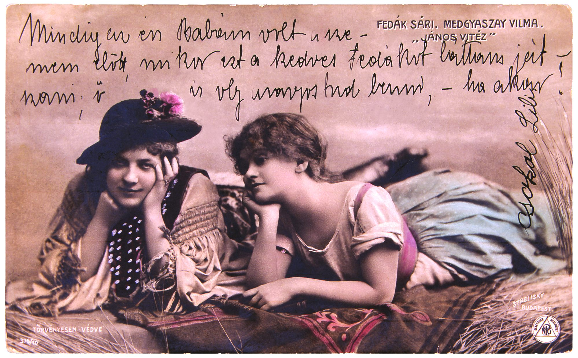 Fedák Sári mint Kukorica Jancsi és Medgyaszay Vilma mint Iluska Kacsóh Pongrác János vitéz című daljátékában National Széchényi Library LocationBudapestCoordinates47° 29′ 53″ N, 19° 02′ 14″ E Established1802Website Accession number: KA 3672/11